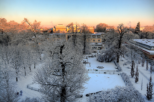 Ansicht des Bleichröderparks von der Schulstrasse